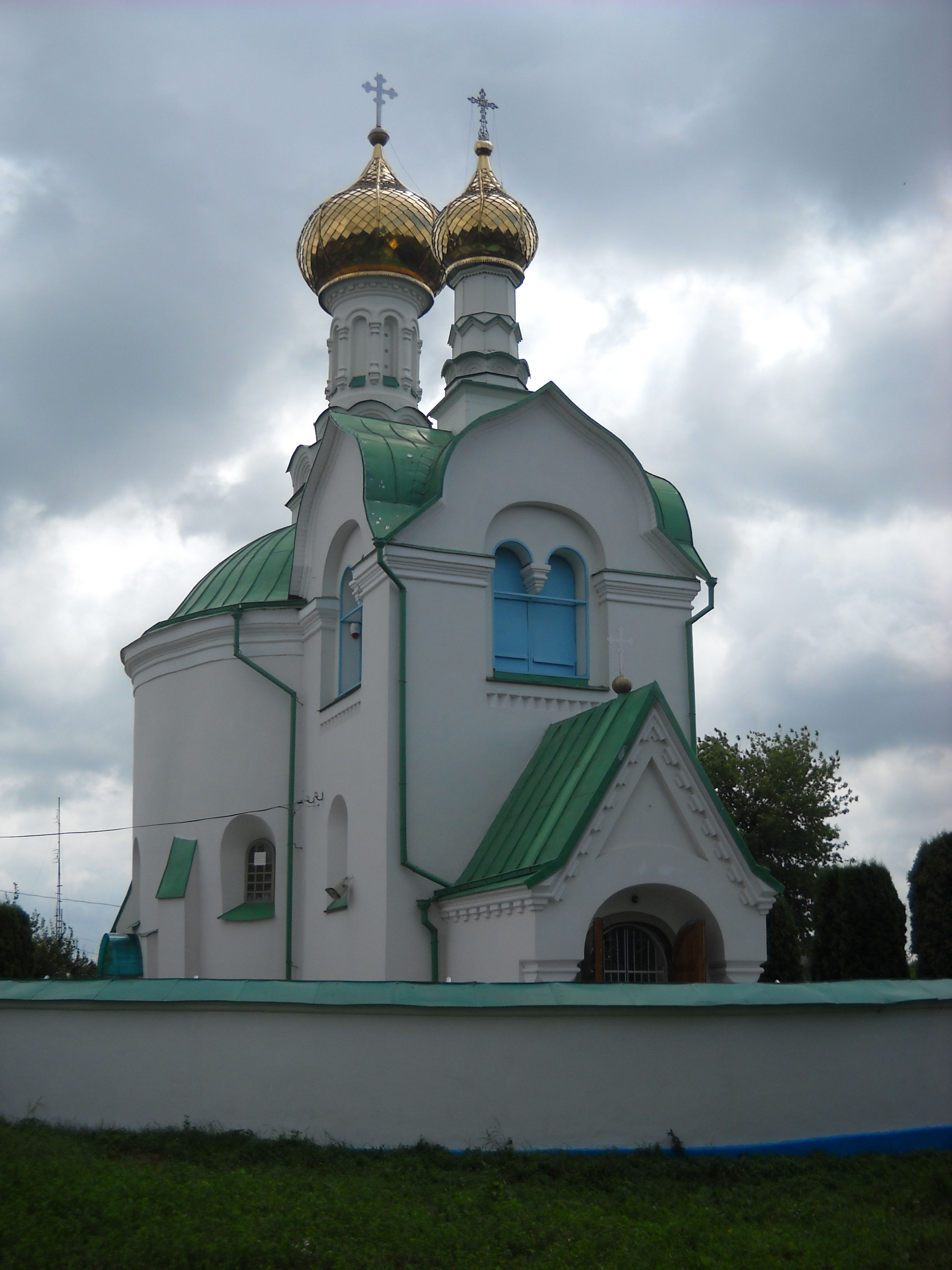 Cerkiew św. Bazylego we Włodzimierzu Wołyńskim